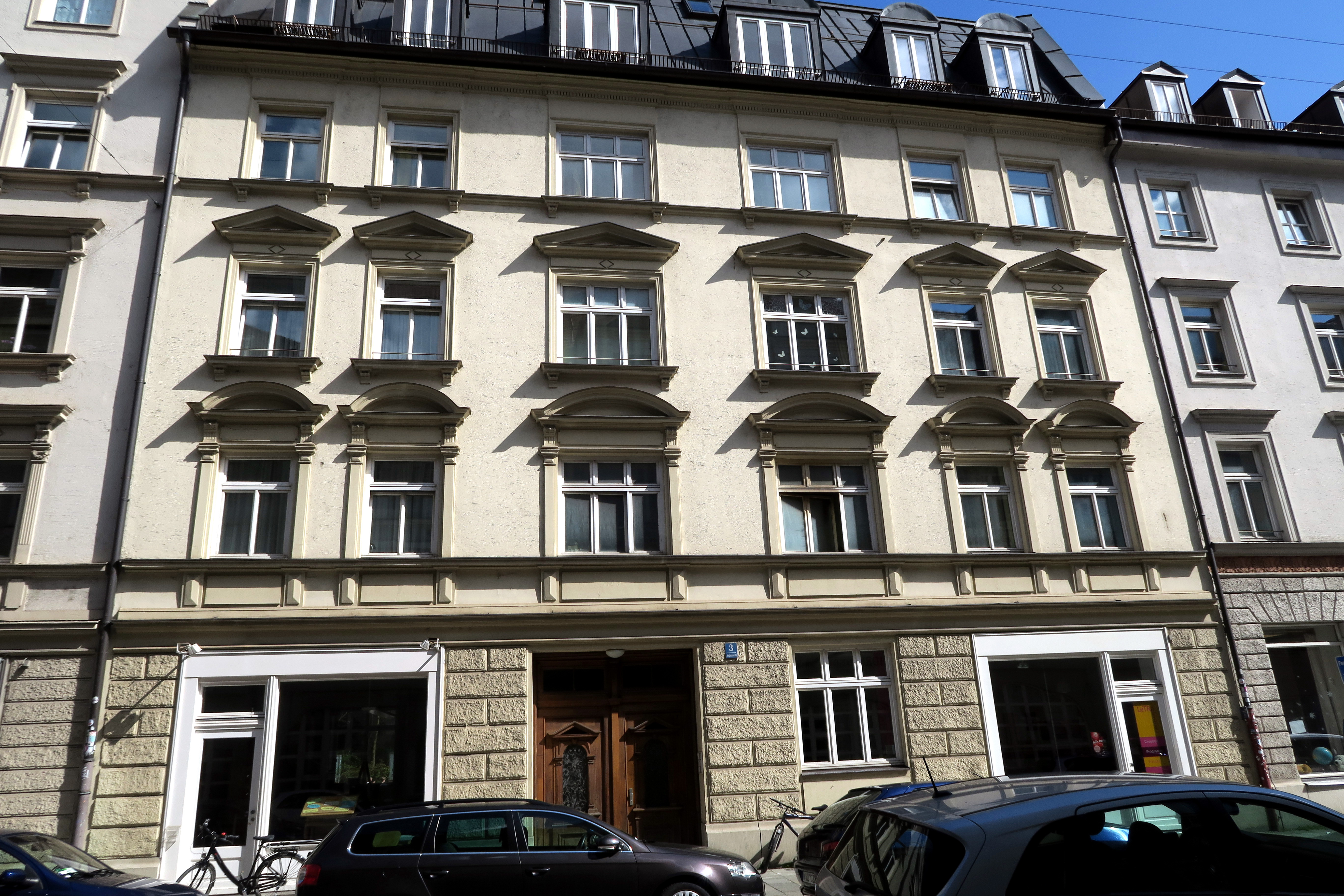 Totale von der Fassade des denkmalgeschützten Hauses Angertorstr. 3, unten links Ladenfenster des WikiMUC